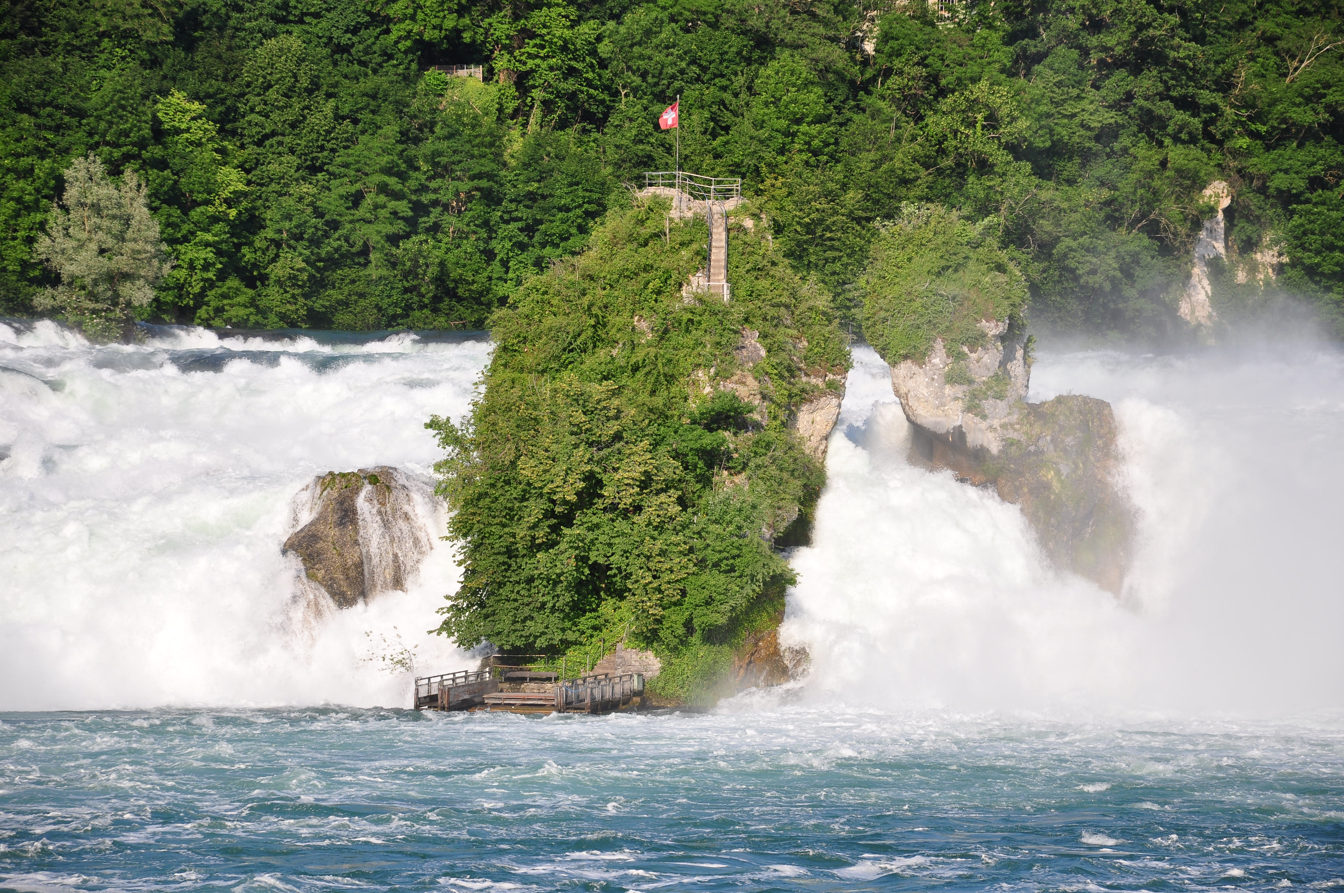 Rheinfall and Schloss Laufen in Laufen-Uhwiesen as seen from Neuhausen am Rheinfall (Switzerland)